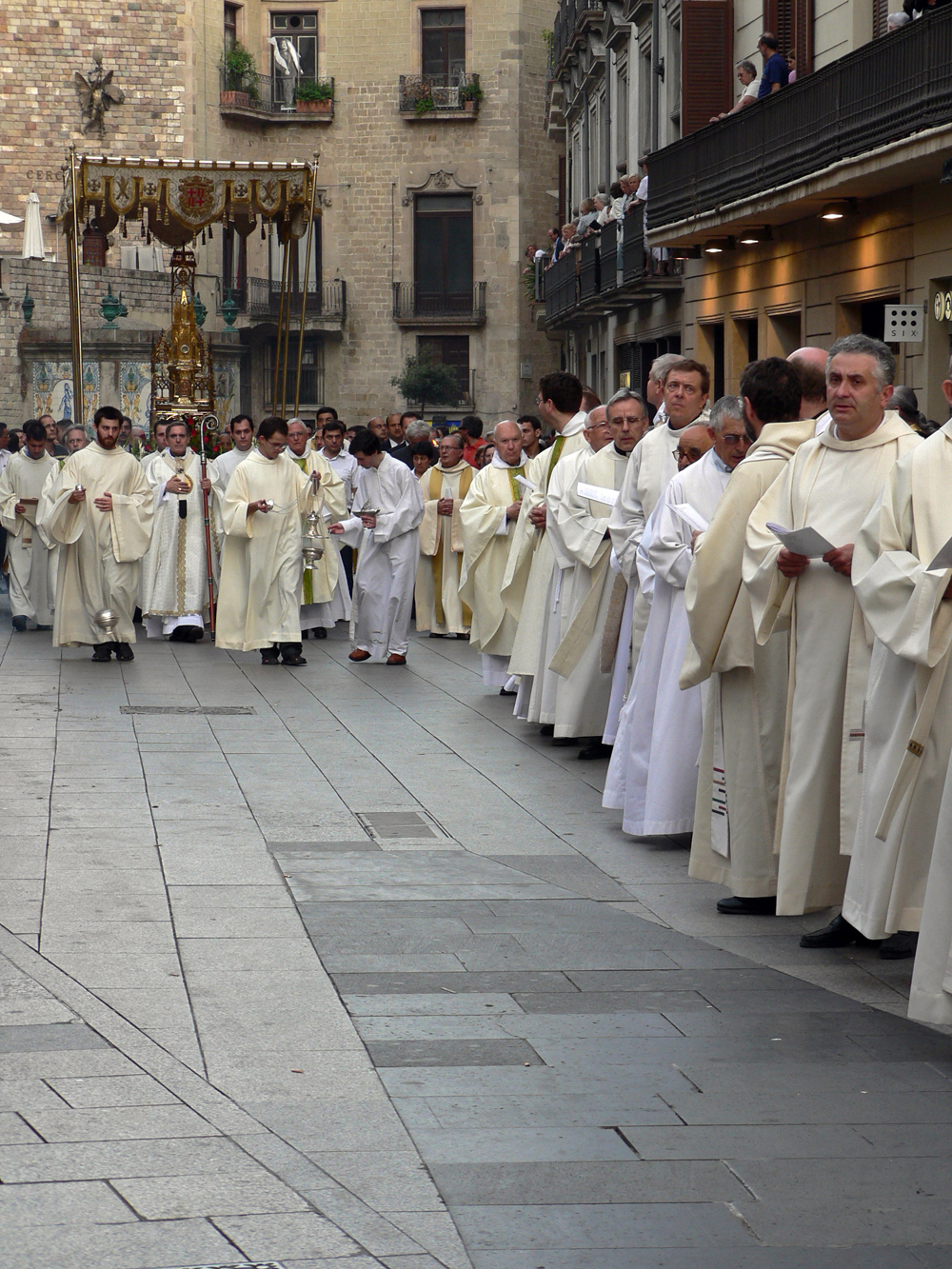 Imatge de la processó del Corpus Christi a Barcelona (Av. Portal de l'Àngel) celebrada el 18 de juny de 2006.